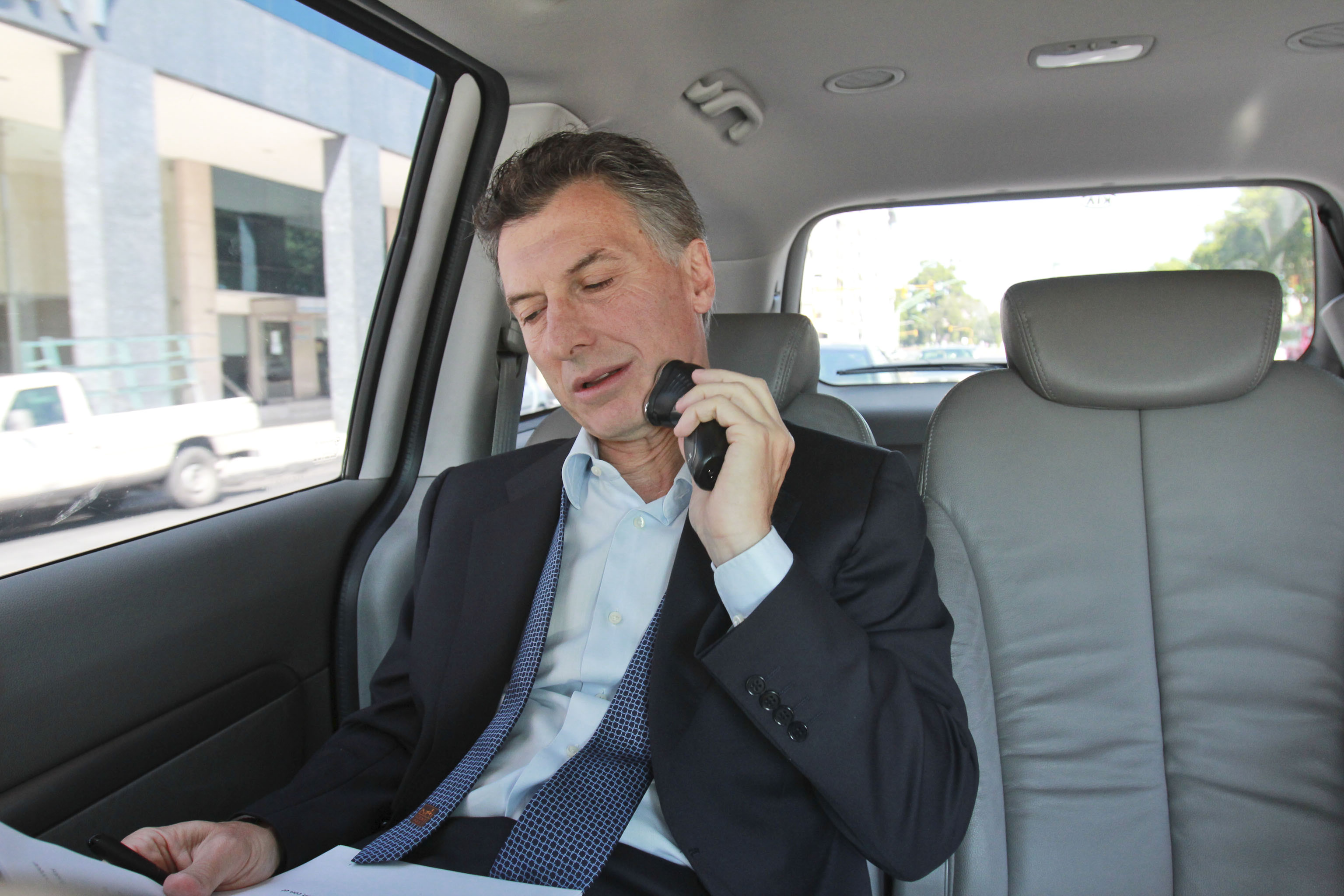 Mauricio Macri saliendo de su casa hacia la Legislatura de la Ciudad.